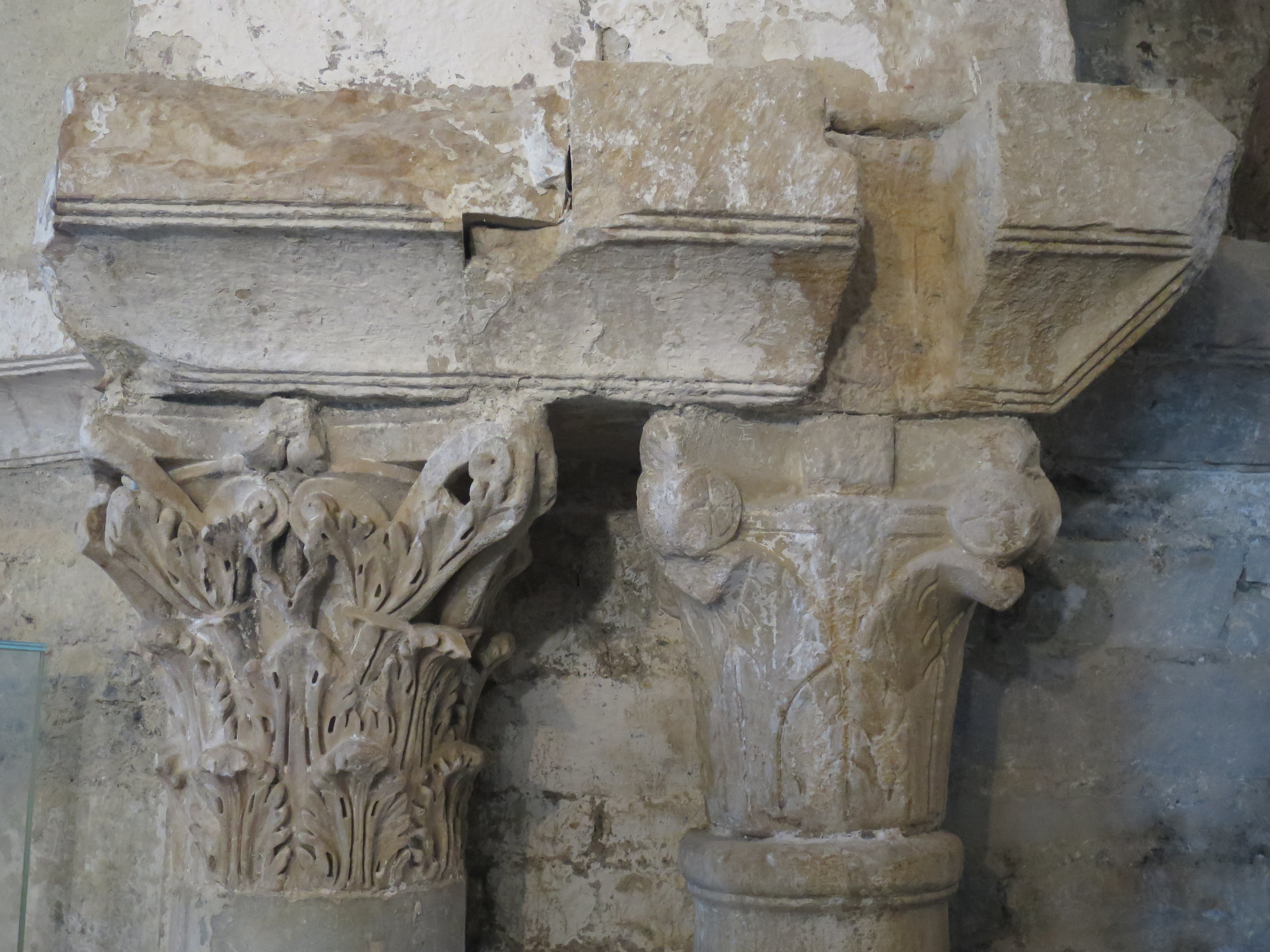 Zwei Kapitelle in der Kirche. Links: römisch, Spolie in Zweitverwendung; rechts: romanisch